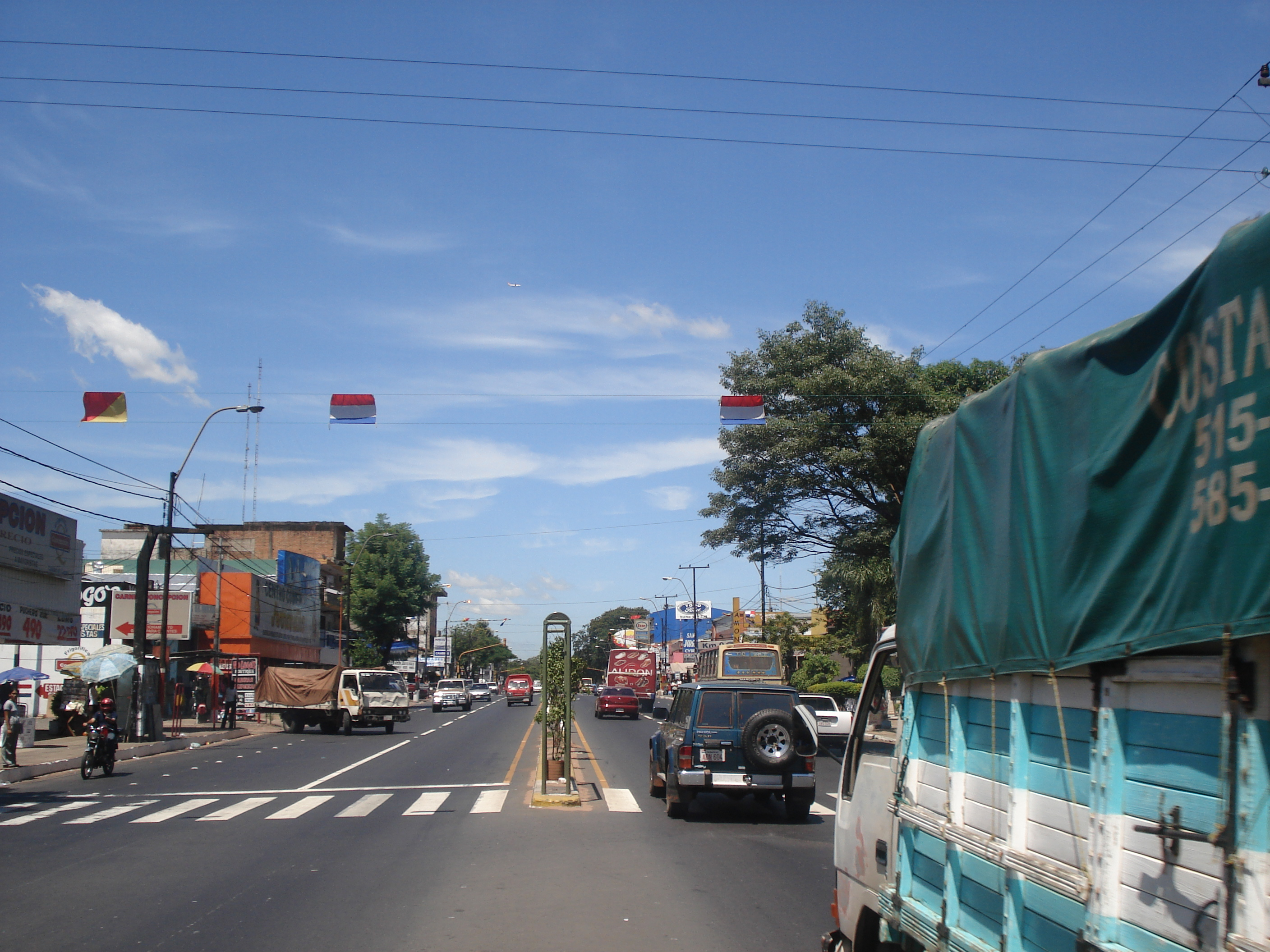 Trafico de Fernando de la Mora